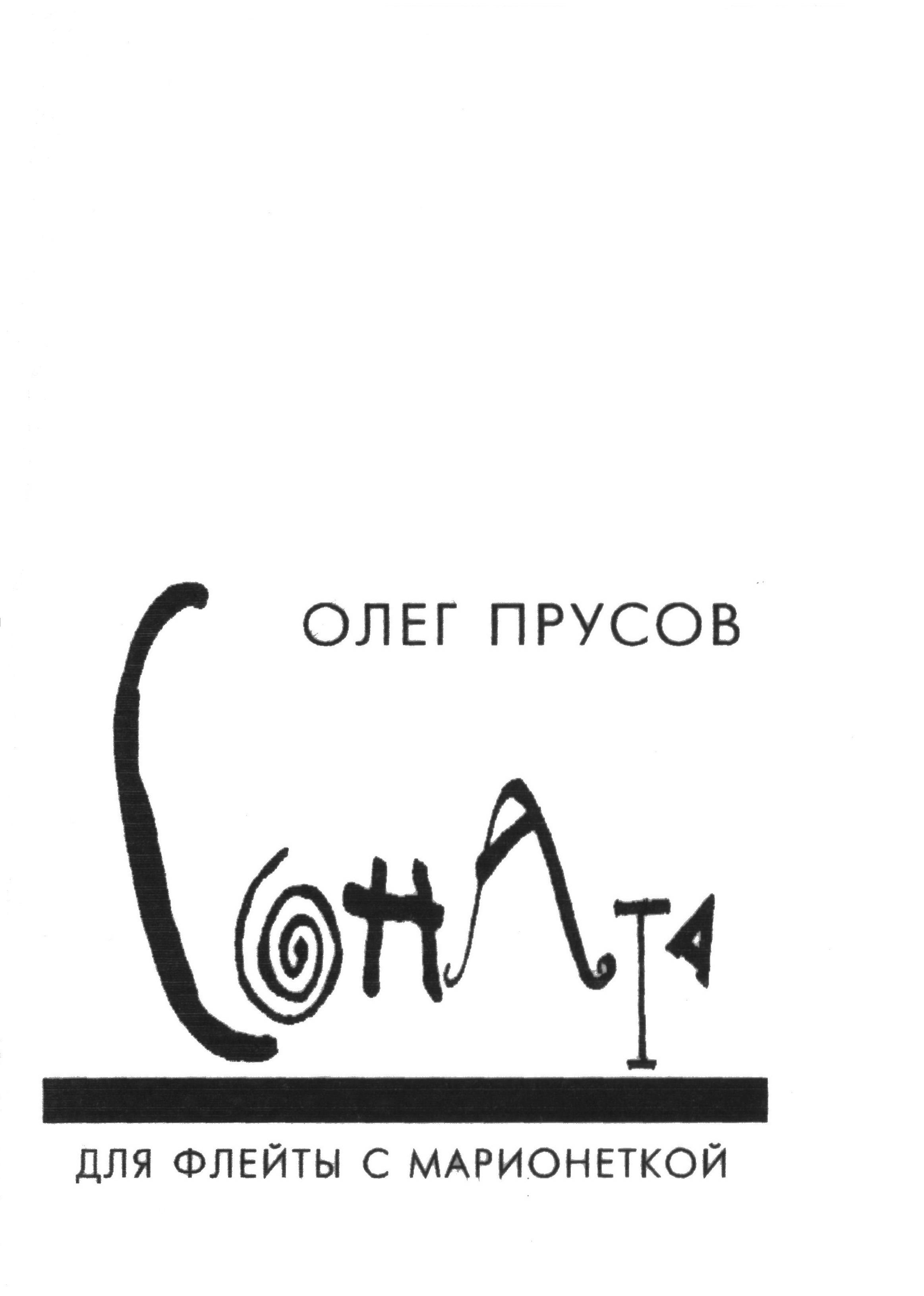 Обложка книги